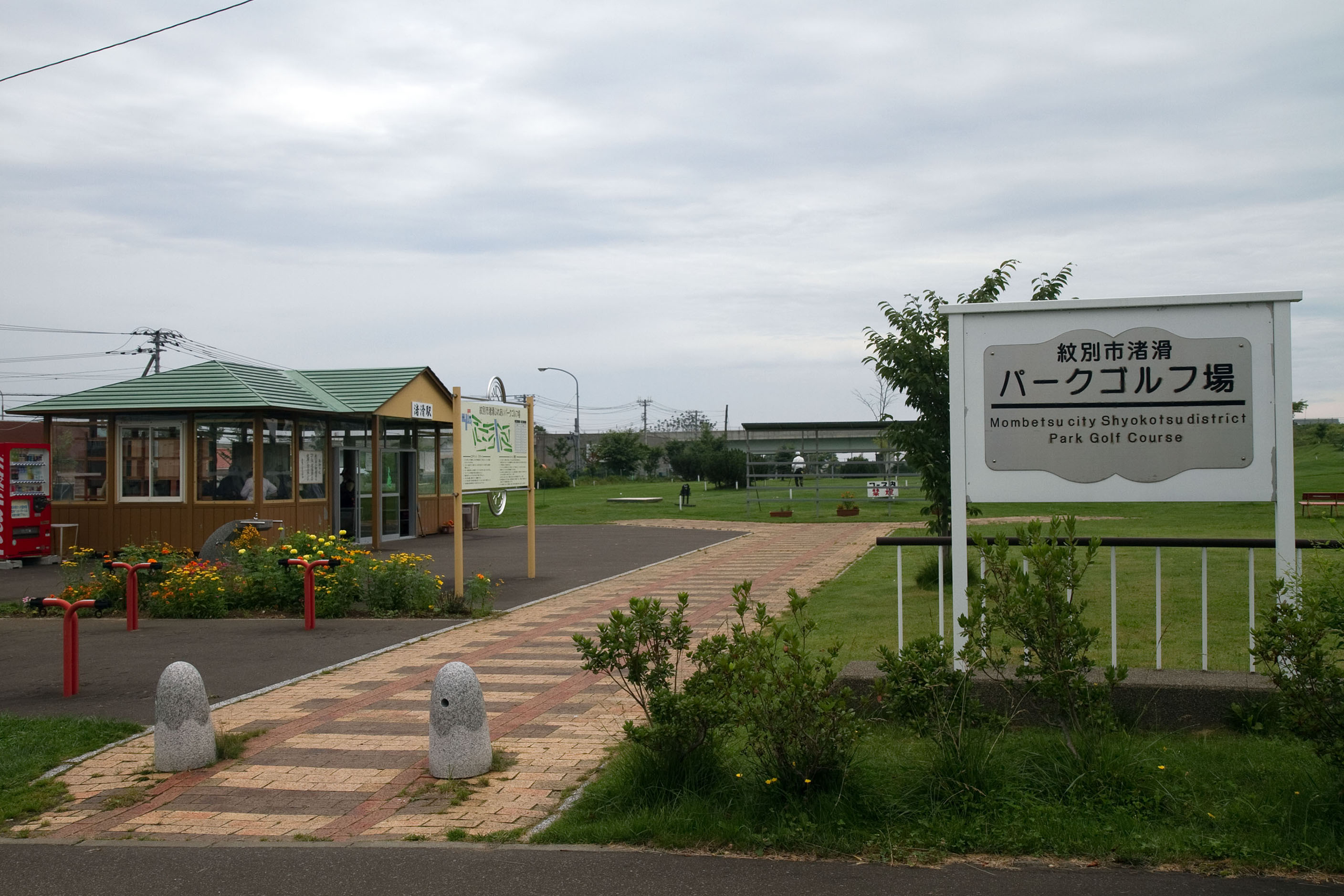 紋別市渚滑パークゴルフ場（旧名寄本線渚滑駅跡）